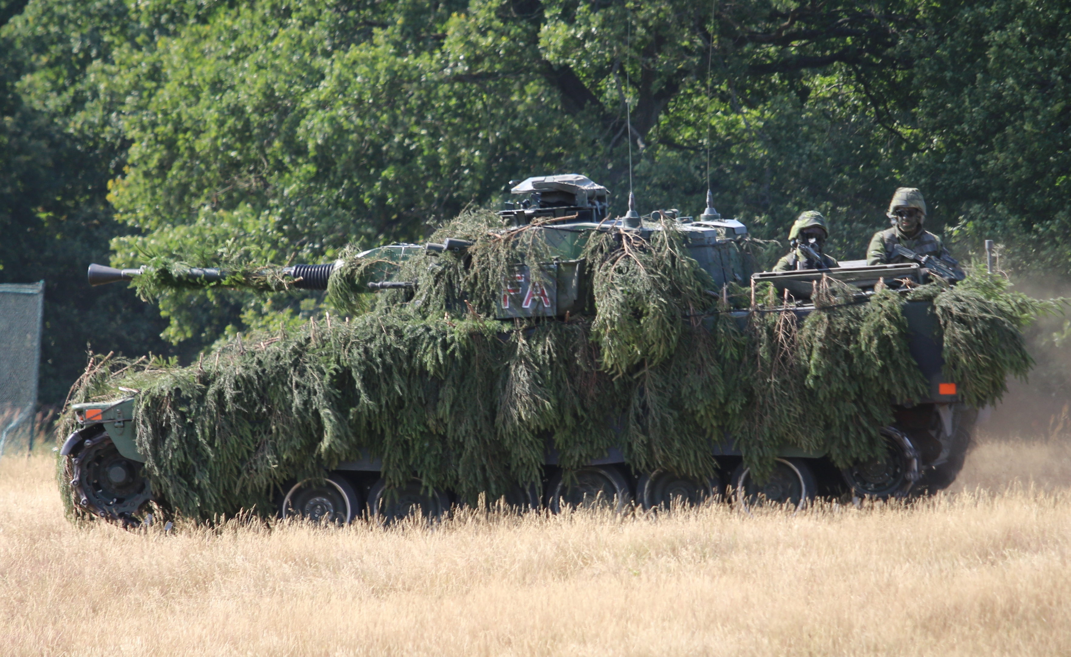 Stridsfordon 9040 Revinge 2015